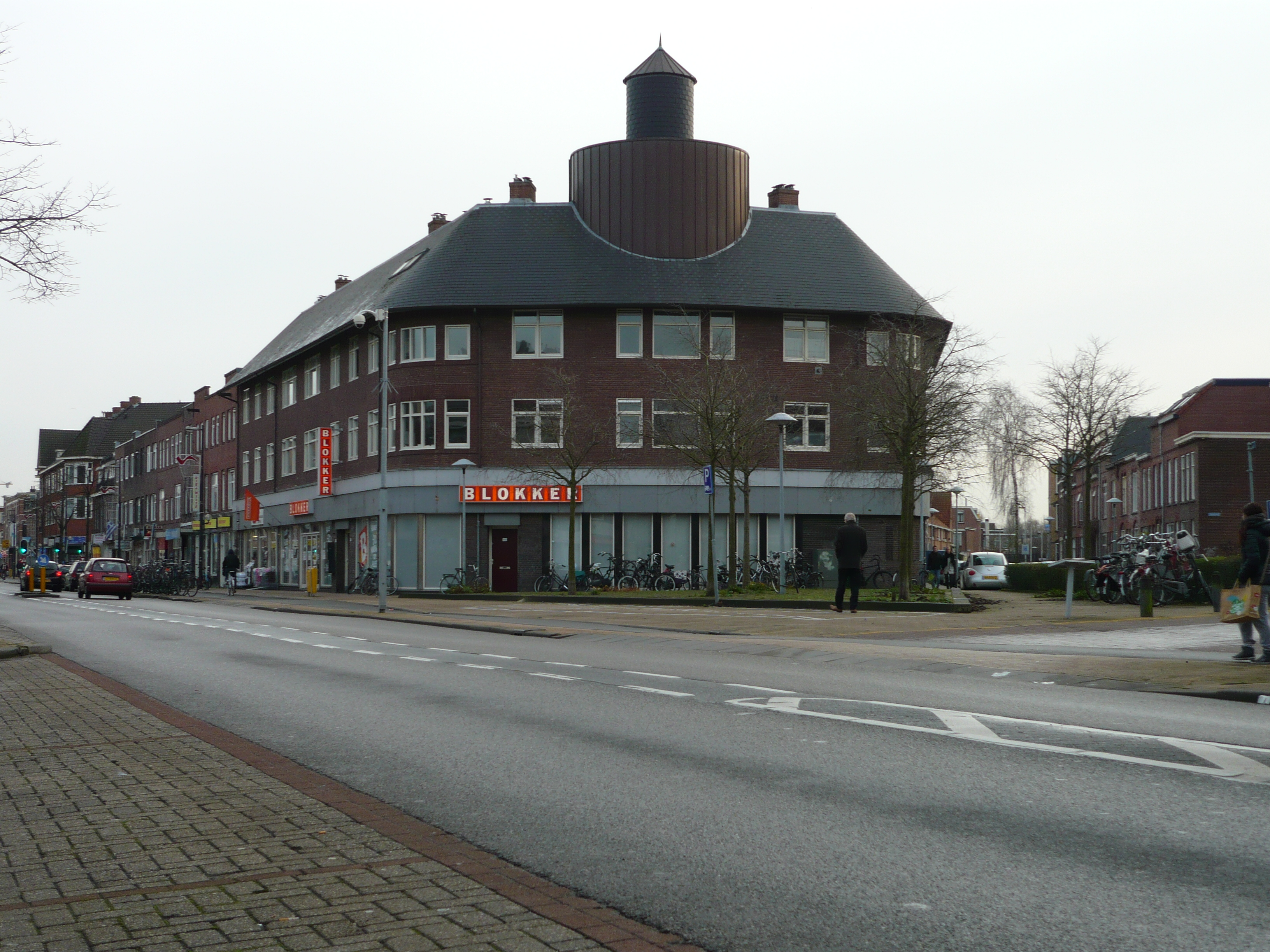 Voormalige bioscoop Olympia met bovenwoningen, Amsterdamsestraatweg 350 te Utrecht. Architect Frits Peutz.